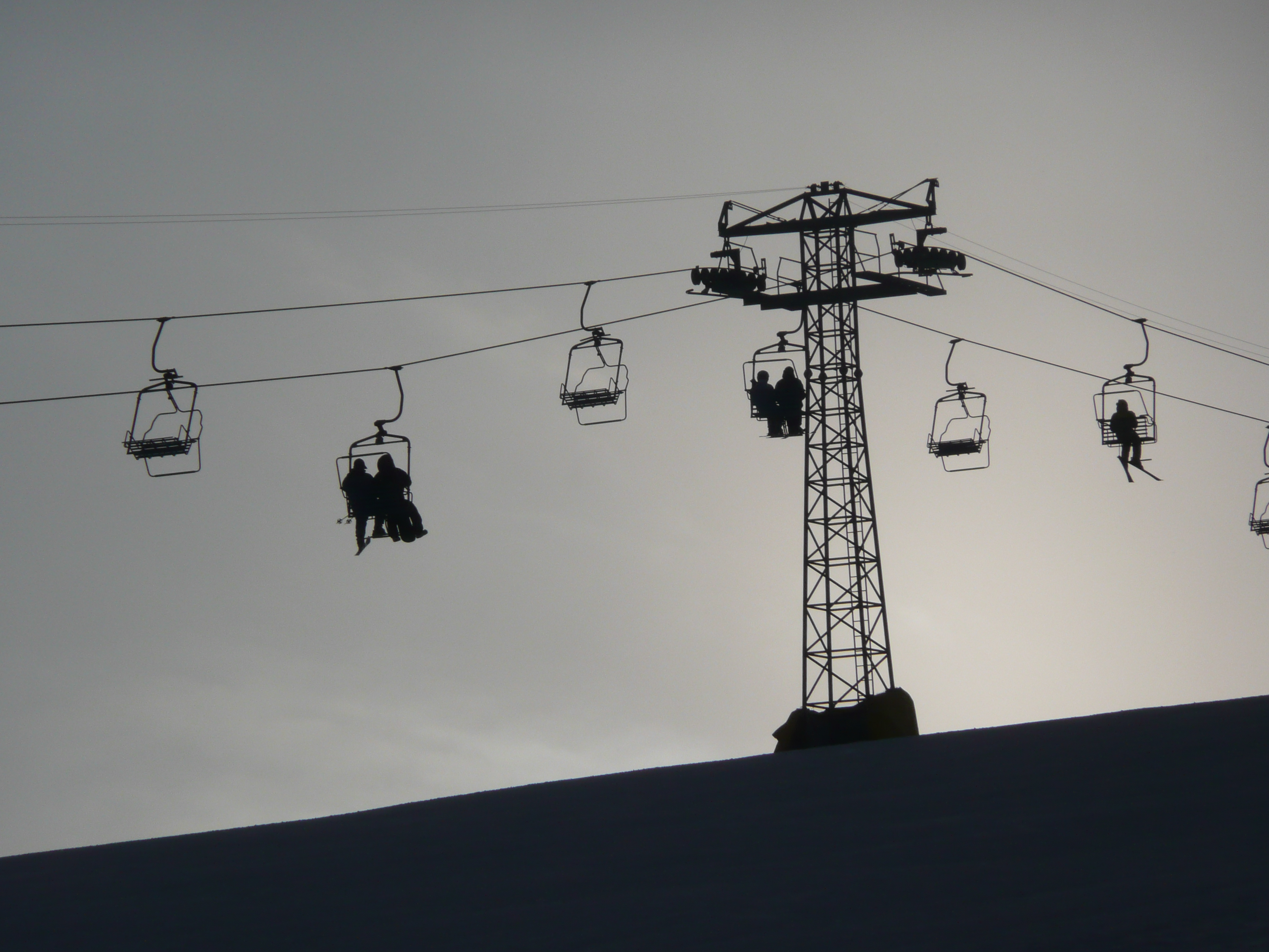 La piste de ski a Orlovka au Kirghizstan